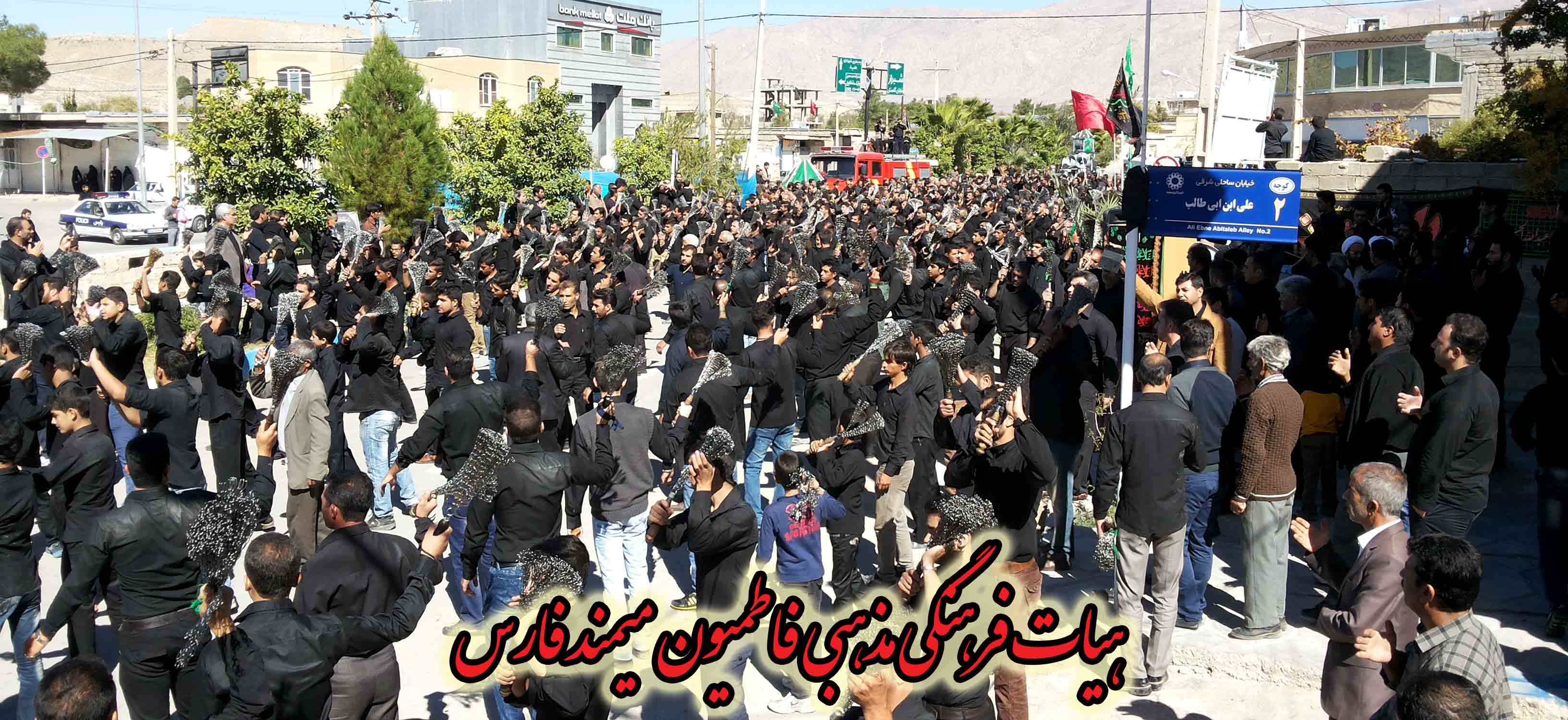 yaali110